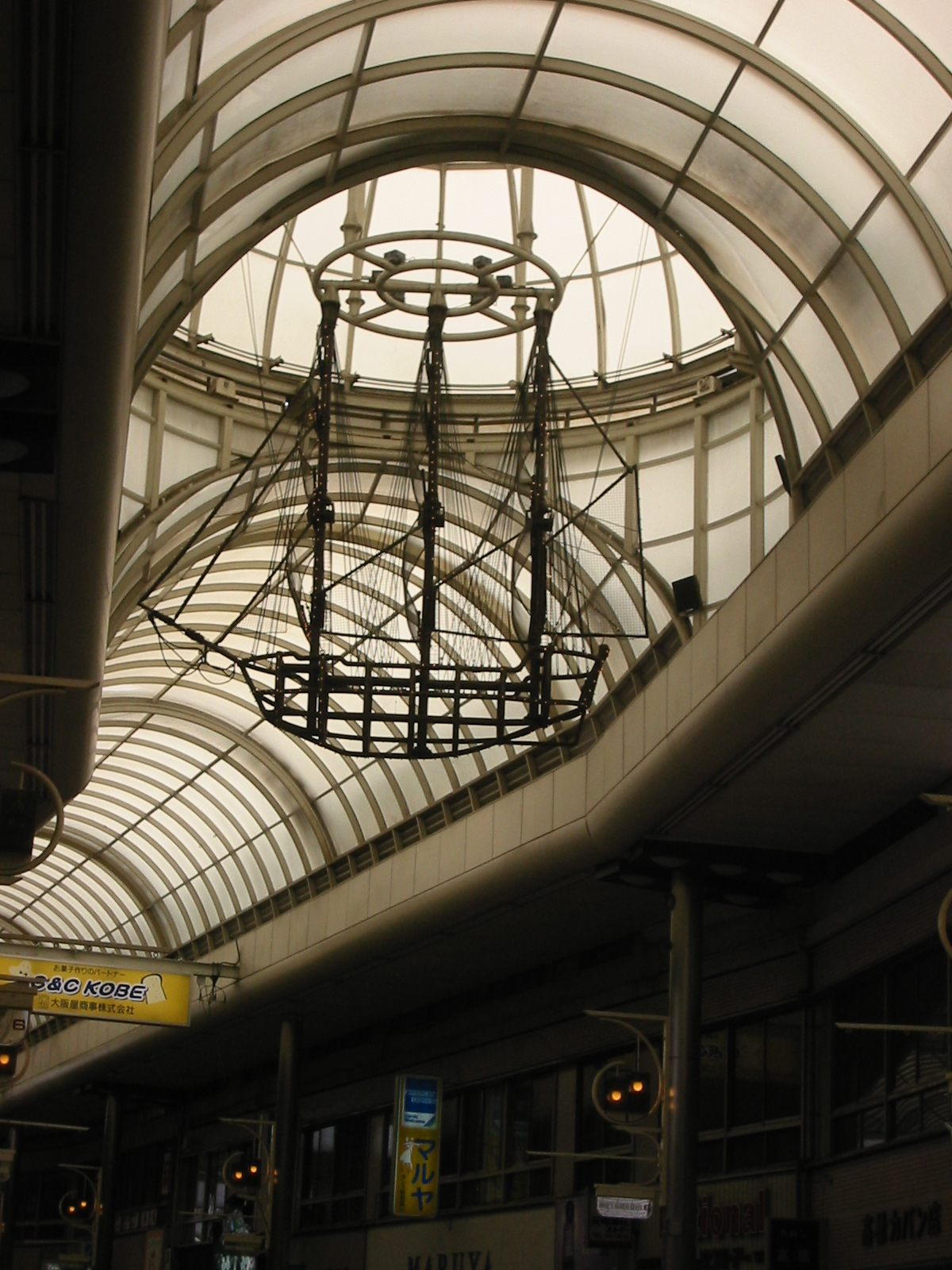 神戸元町商店街にて。